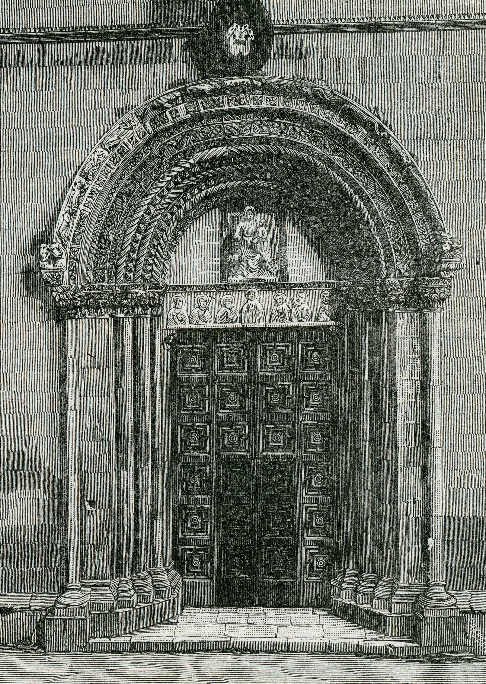 L'Aquila, il portale della chiesa di Santa Maria Paganica (xilografia di Barberis 1898).